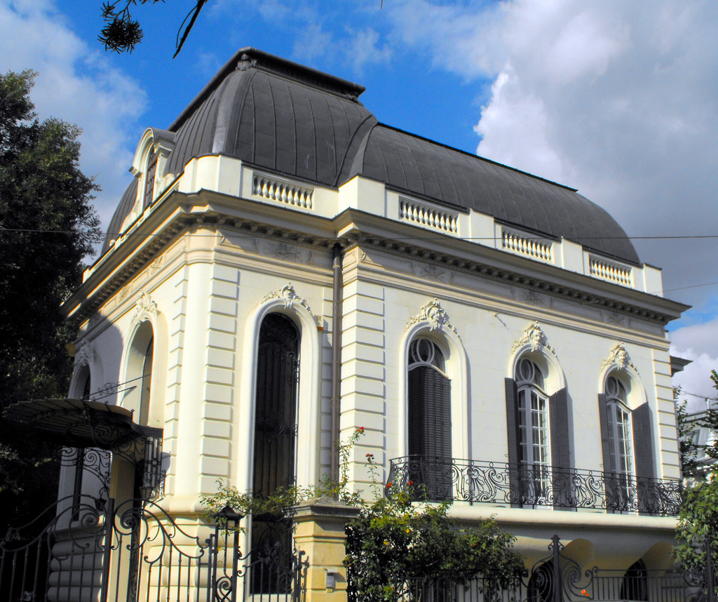 Dumbrava Rosie 11